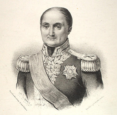 Jérome Bonaparte, King of Westphalia (1784-1860). Lithograph, Pennington Catalogue p. 1879 //Paris, Rosselin, éditeur 21, Quai Voltaire // Paris, Imp. Auguste Bry 114 r. du Bac. // N° 18. 3e. Vol.